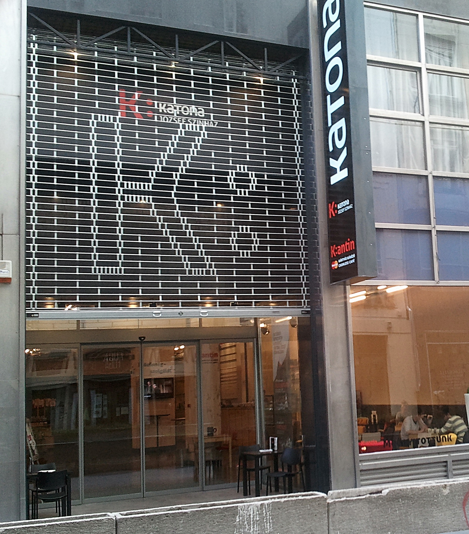 A Budapesti Katona József Színház új portálja. V. kerület, Petőfi Sándor utca.